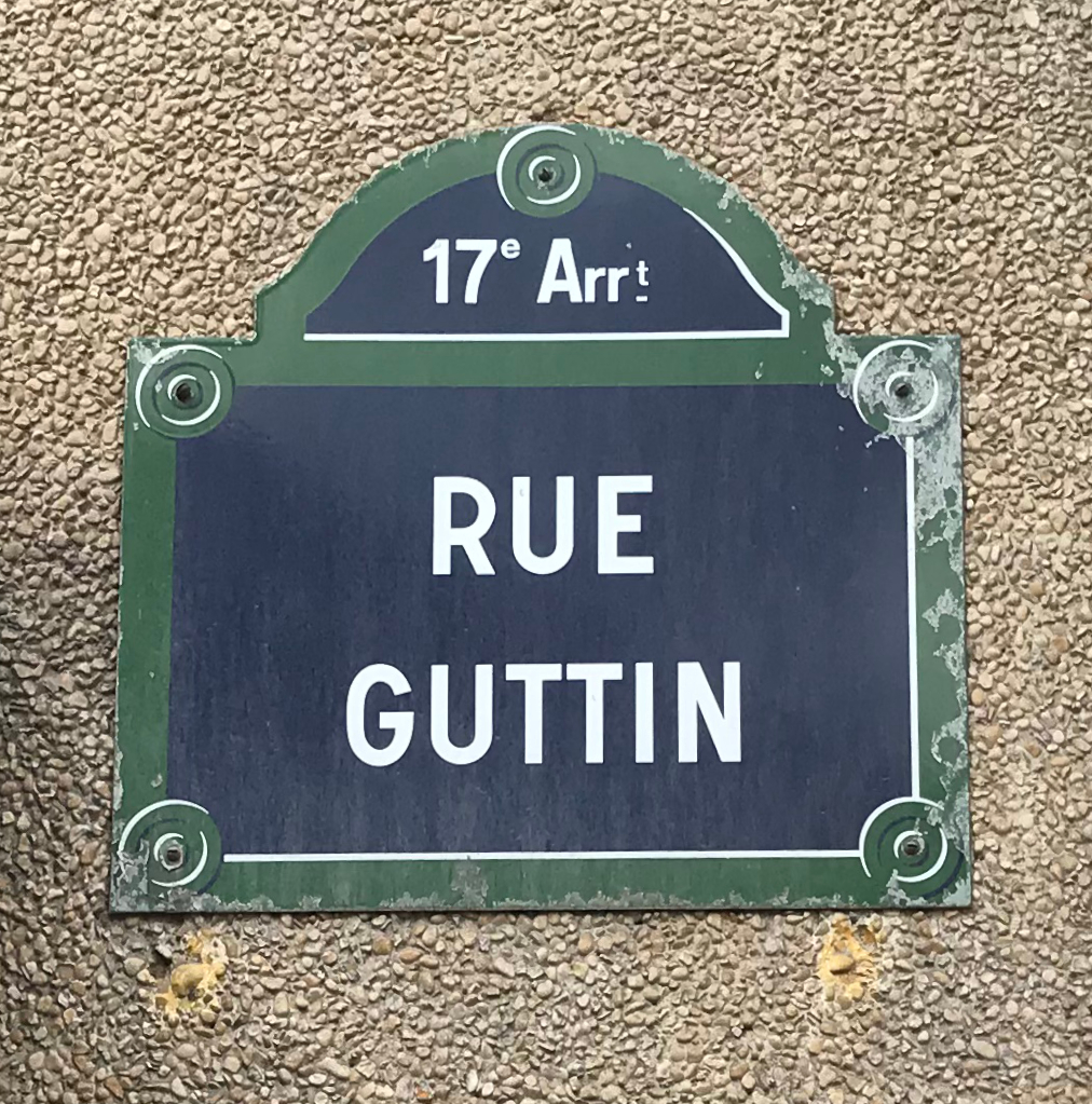 Image de Paris, septembre 2018.